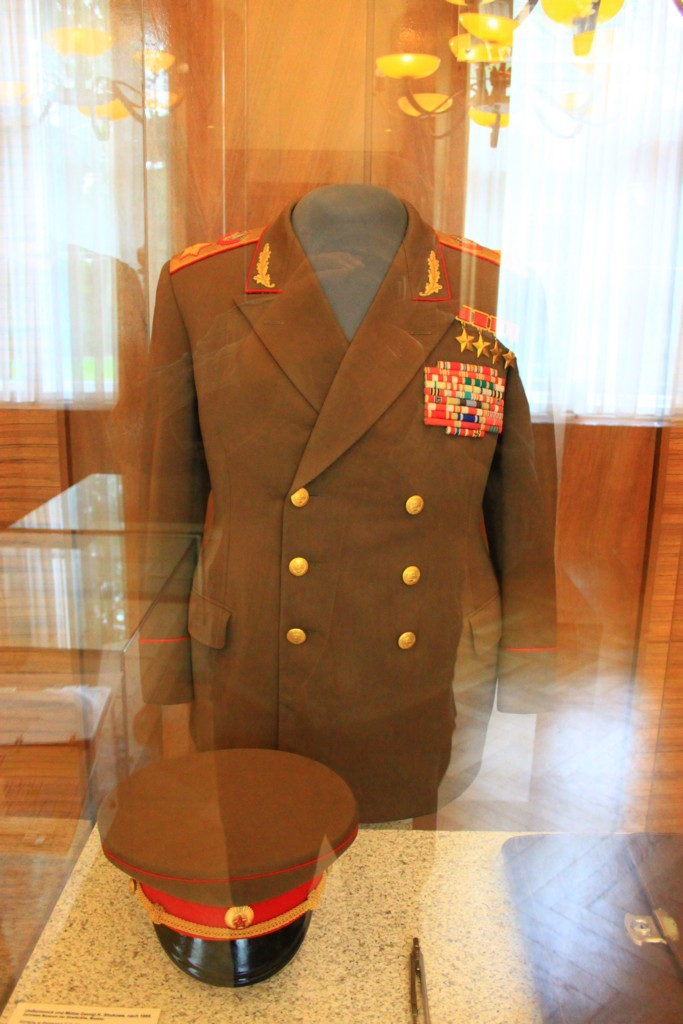 Divisa del Maresciallo Žukov esposta presso il Museo Tedesco Russo di Berlino